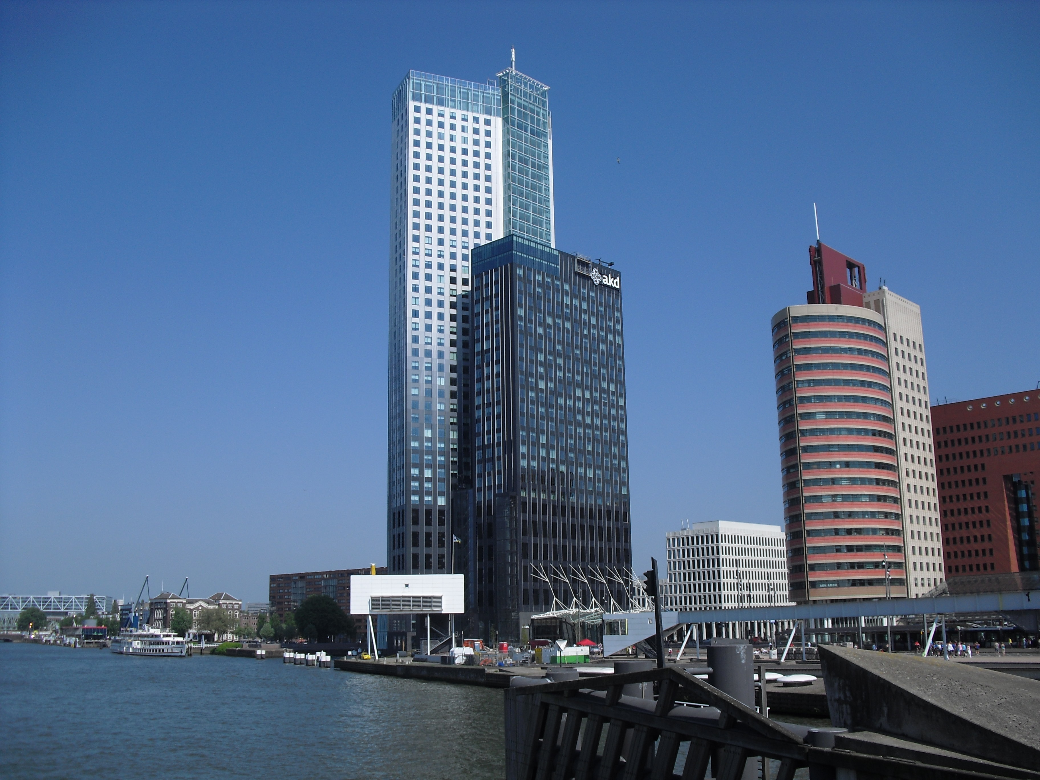 De maastoren in Rotterdam. Foto genomen vanaf de Erasmusbrug